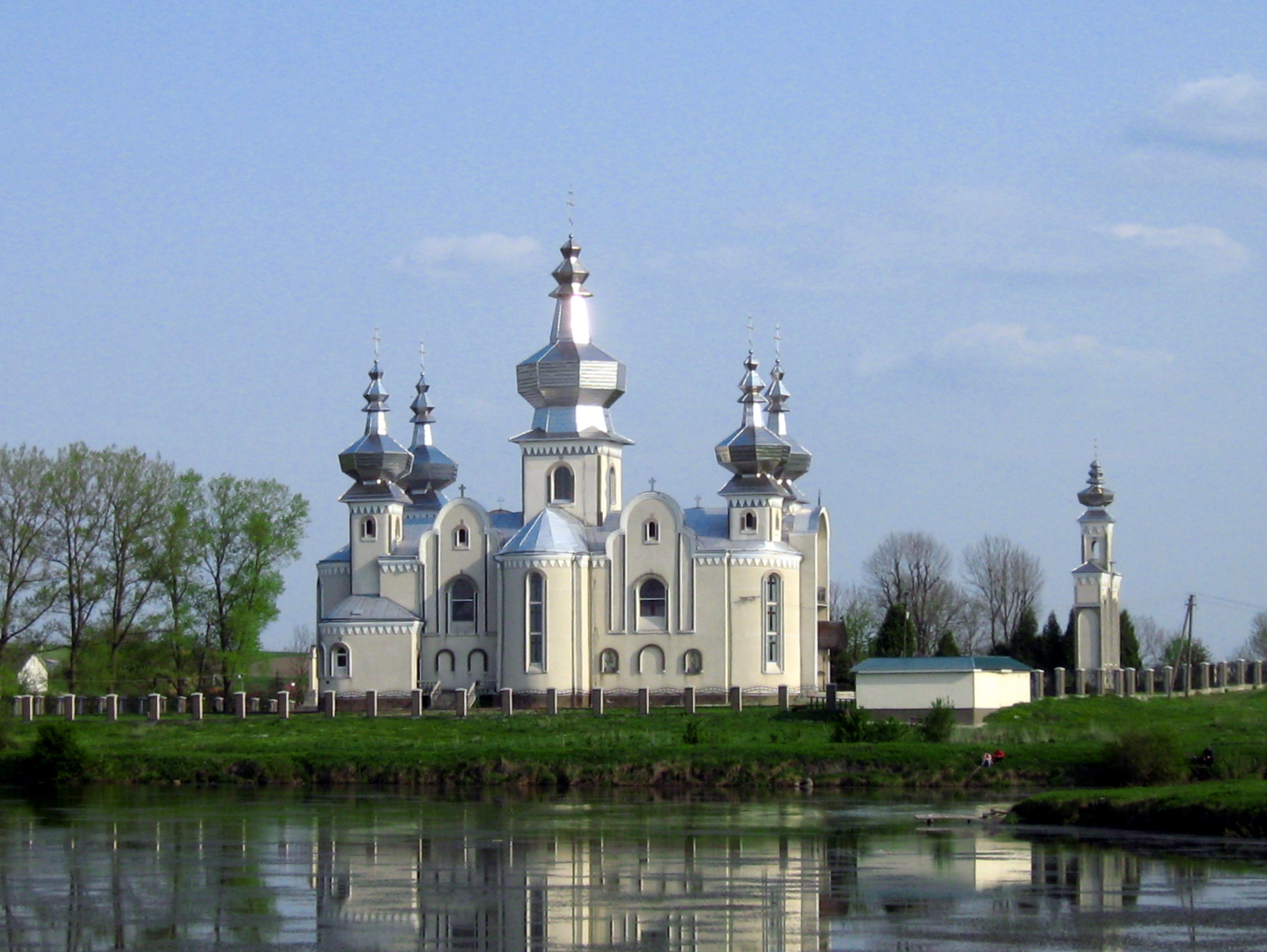 cerkiew we Lwowie (Sokolniki)